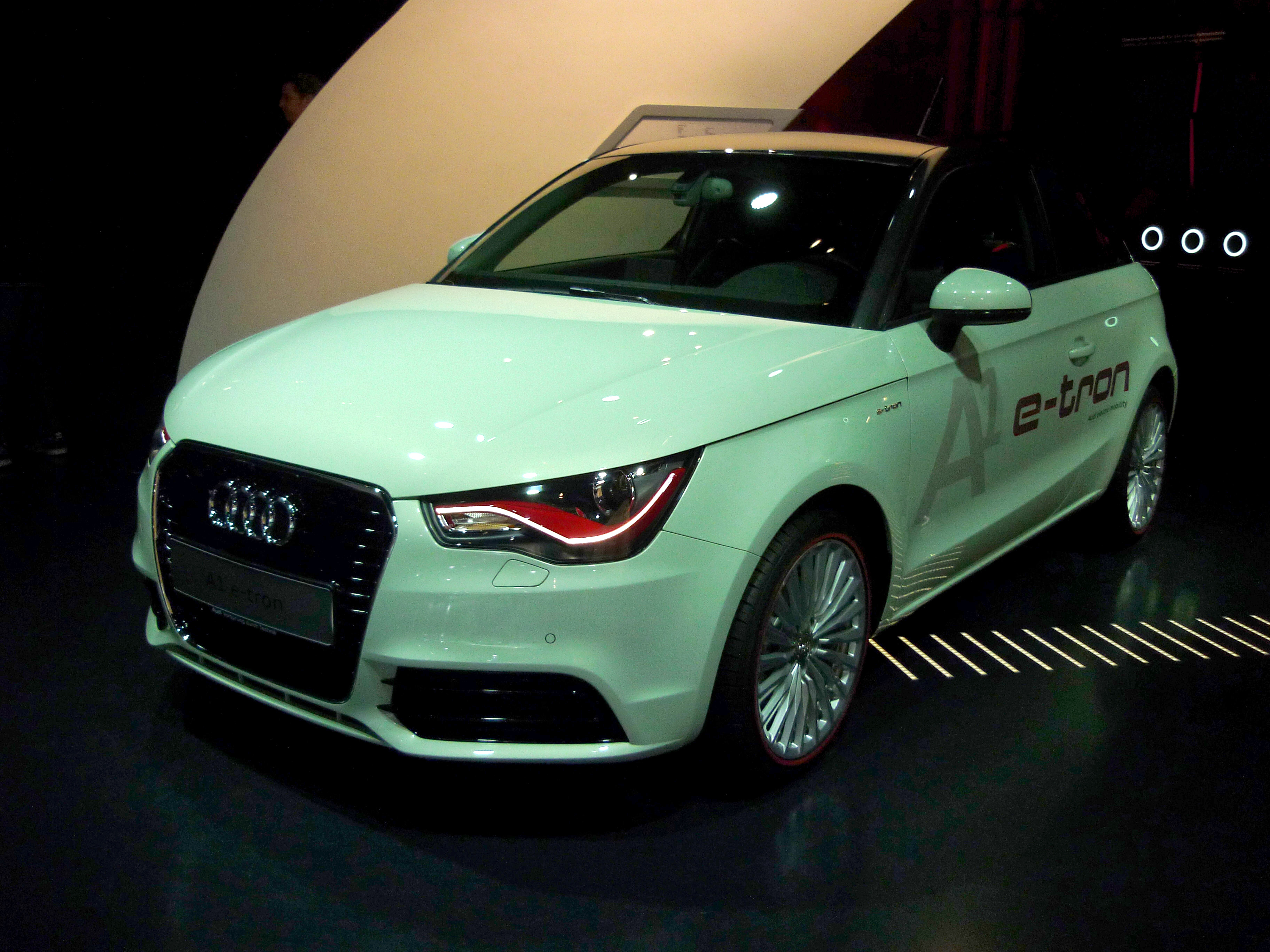 Autostadt Wolfsburg